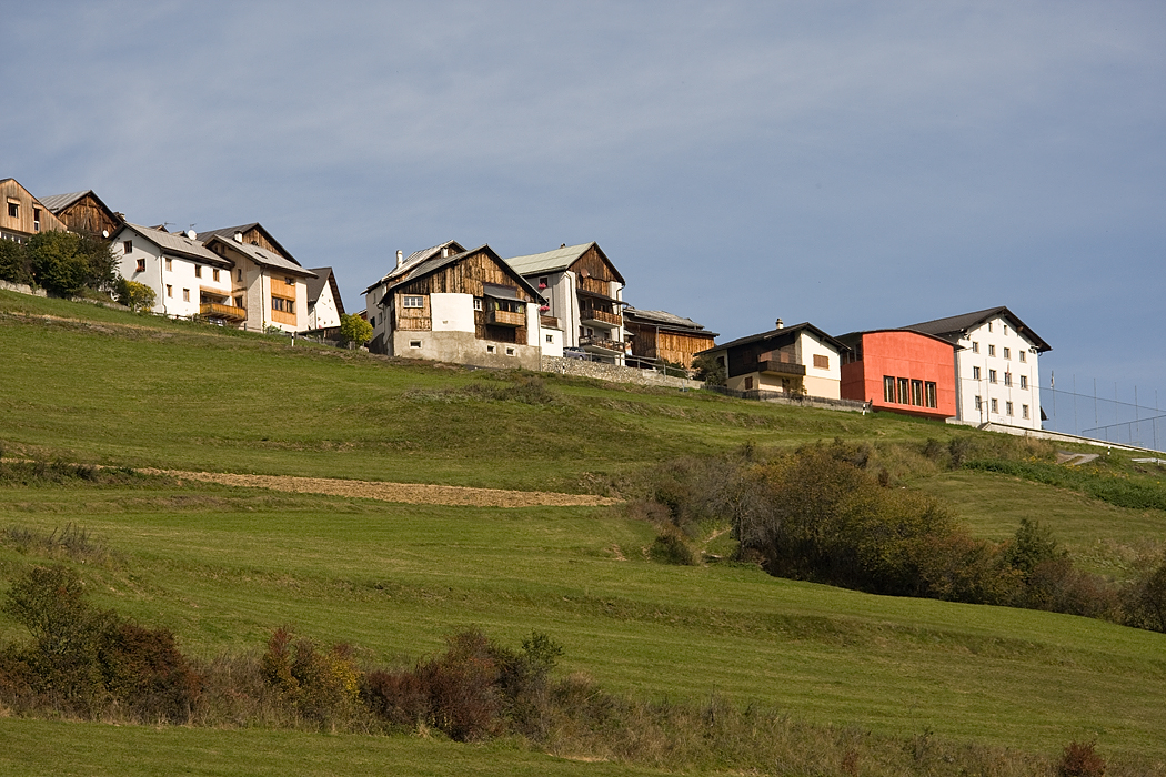 Tschlin an steiler Hanglage im Unterengadin